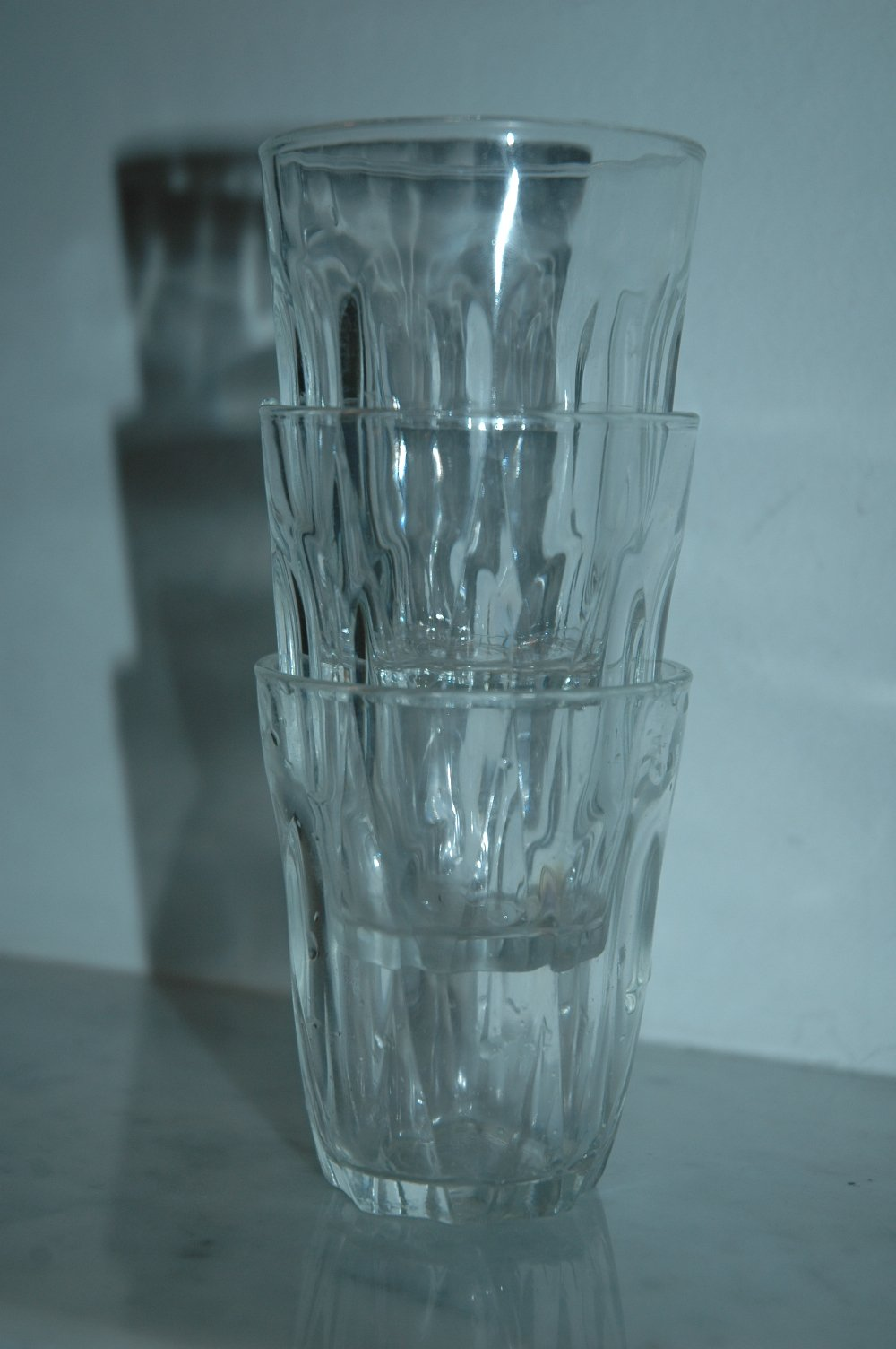 Verres Duralex Provence